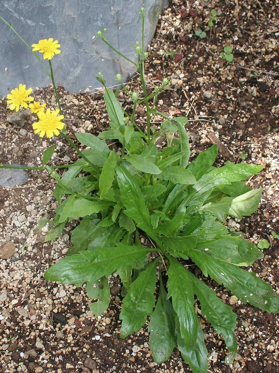 Tolpis glabrescens, conservatoire botanique national de Brest, France, juin 2007